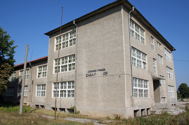 Сава Геренов